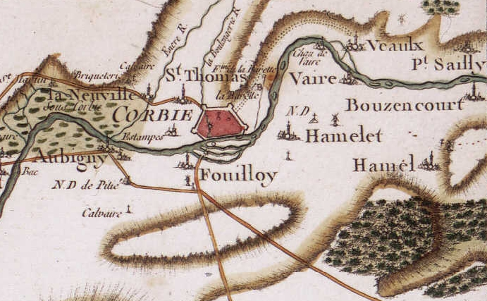 Corbie (France) - Carte de Cassini, vers 1780